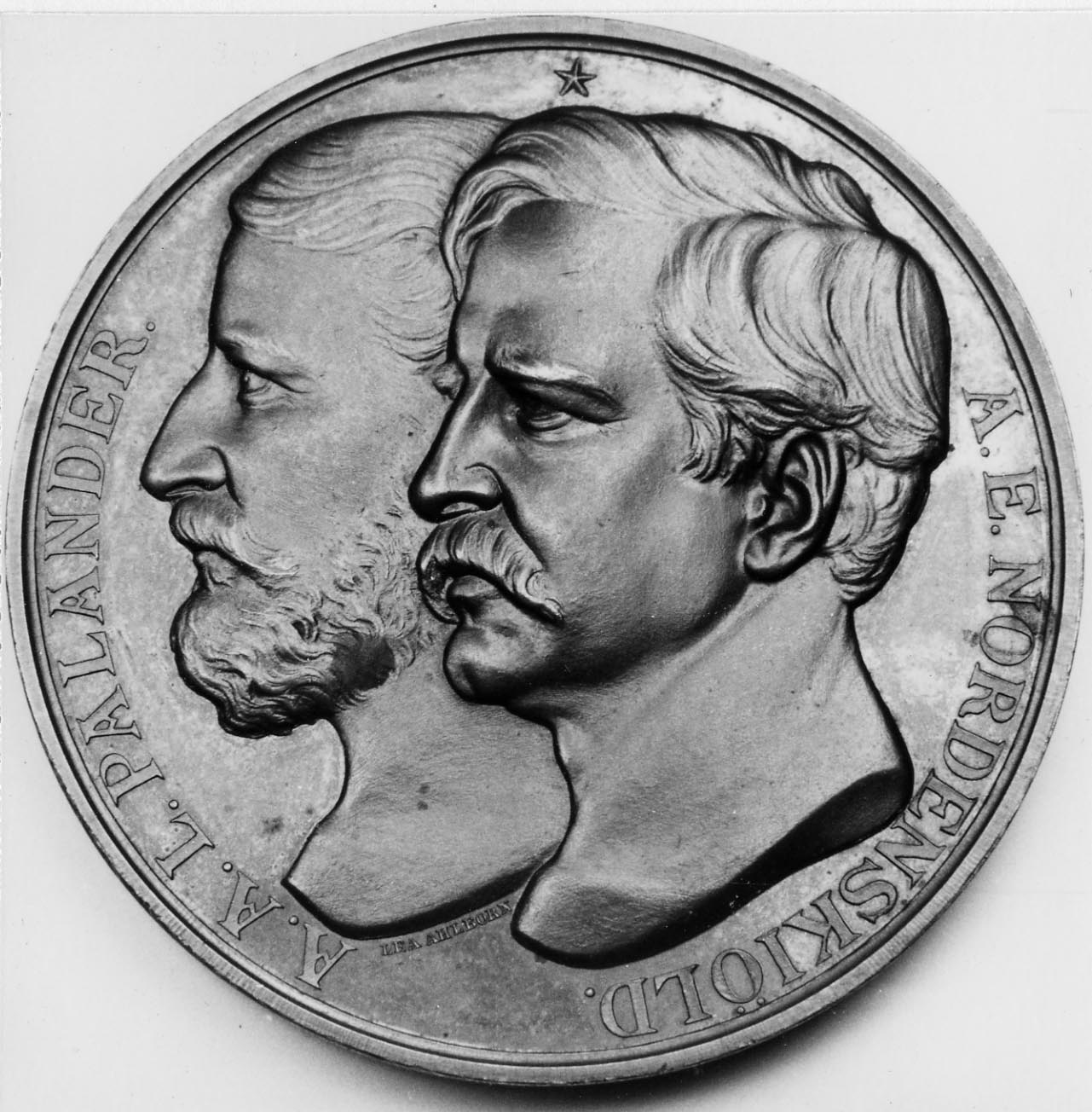 Minnesmedalj i brons över Nordostpassagens fullbordande 1878-79, präglad på uppdrag av Kungliga vetenskapsakademien 1880. Framsidan: porträtt av A.E. Nordenskiöld och A.A.L. Palander af Vega. Frånsida:fångstfartyget Vega i polaris.